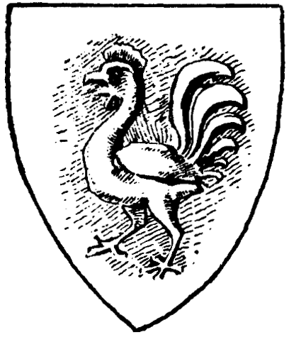 Pieczęć herbowa rodziny Taderów z 1300 roku